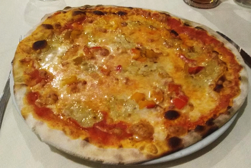 Pizza con peperoni e bagna caoda